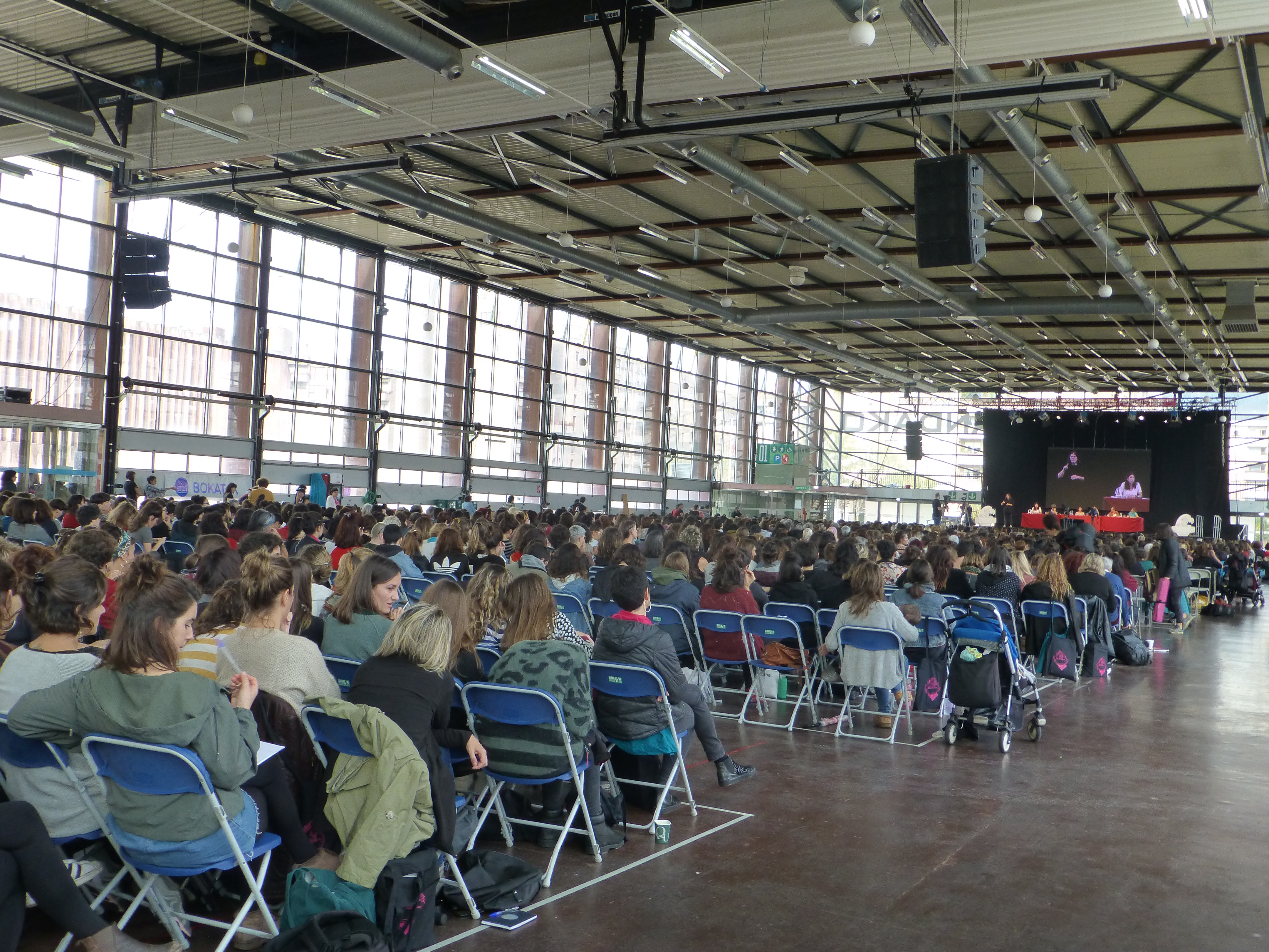 Durangon, 2019ko azaroaren 1-3 tartean ospatu ziren 5. jardunaldi Feministak.